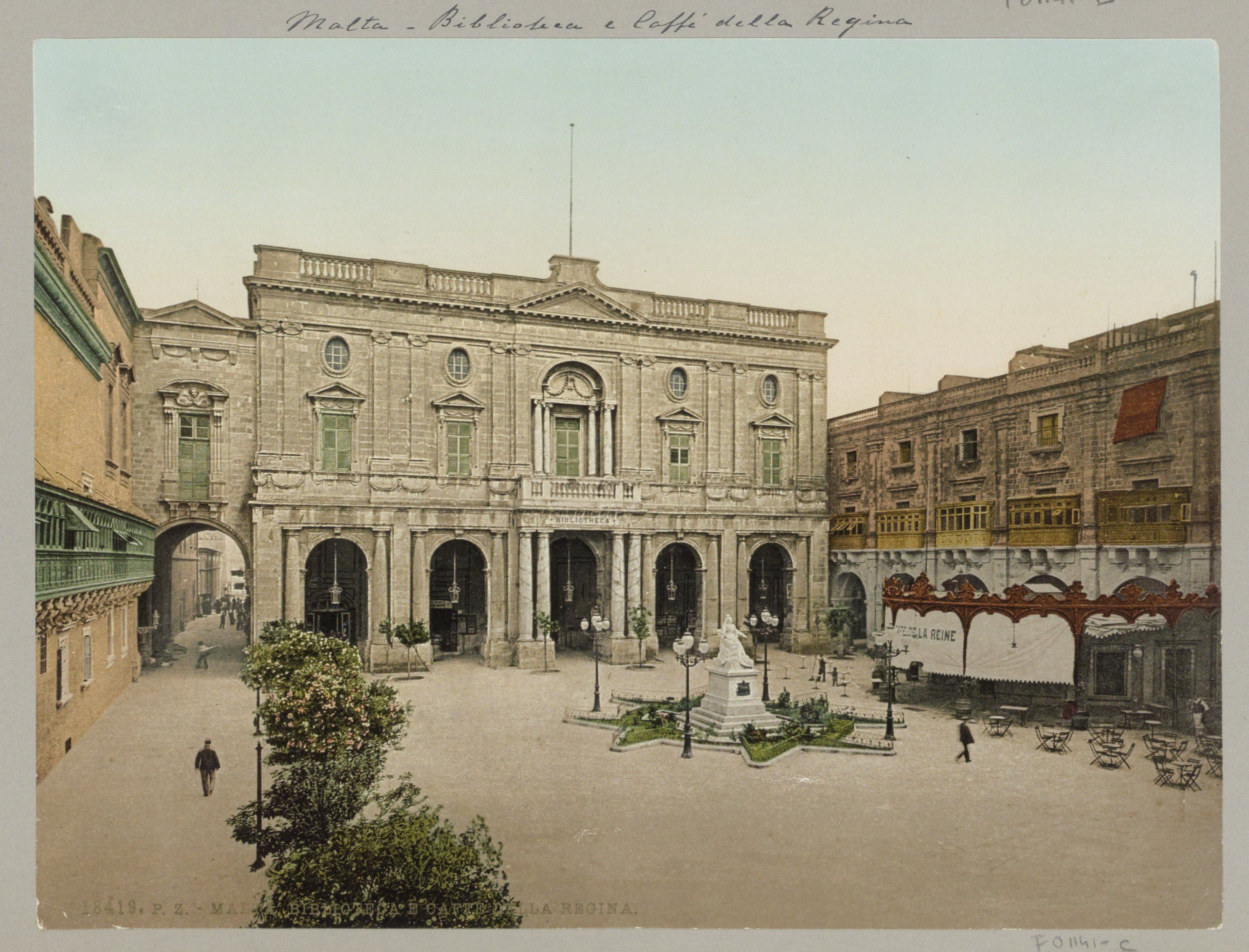 IdentificatieTitel(s): Plein met bibliotheek en Café della Regina in Valletta op MaltaMalta. Biblioteca e caffe della Regina. (titel op object)Objecttype: fotomechanische afdruk Objectnummer: RP-F-F01141-COpschriften / Merken: nummer, recto, gedrukt: ‘18419’Omschrijving: Onderdeel van Fotoalbum van een reis door Zuid-Europa en het Midden-Oosten.VervaardigingVervaardiger: fotograaf: anoniemclichémaker: Photochrom Zürich (vermeld op object)Plaats vervaardiging: fotograaf: Vallettaclichémaker: ZürichDatering: ca. 1900 - in of voor apr-1910Fysieke kenmerken: fotochroomafdrukMateriaal: papier Techniek: fotochroomafdrukAfmetingen: h 170 mm × b 226 mmOnderwerpWat: square, place, circus, etc. (+ city(-scape) with figures, staffage)public libraryhotel, hostelry, innWaar: VallettaVerwerving en rechtenVerwerving: overdracht van beheer 1994Copyright: Publiek domein